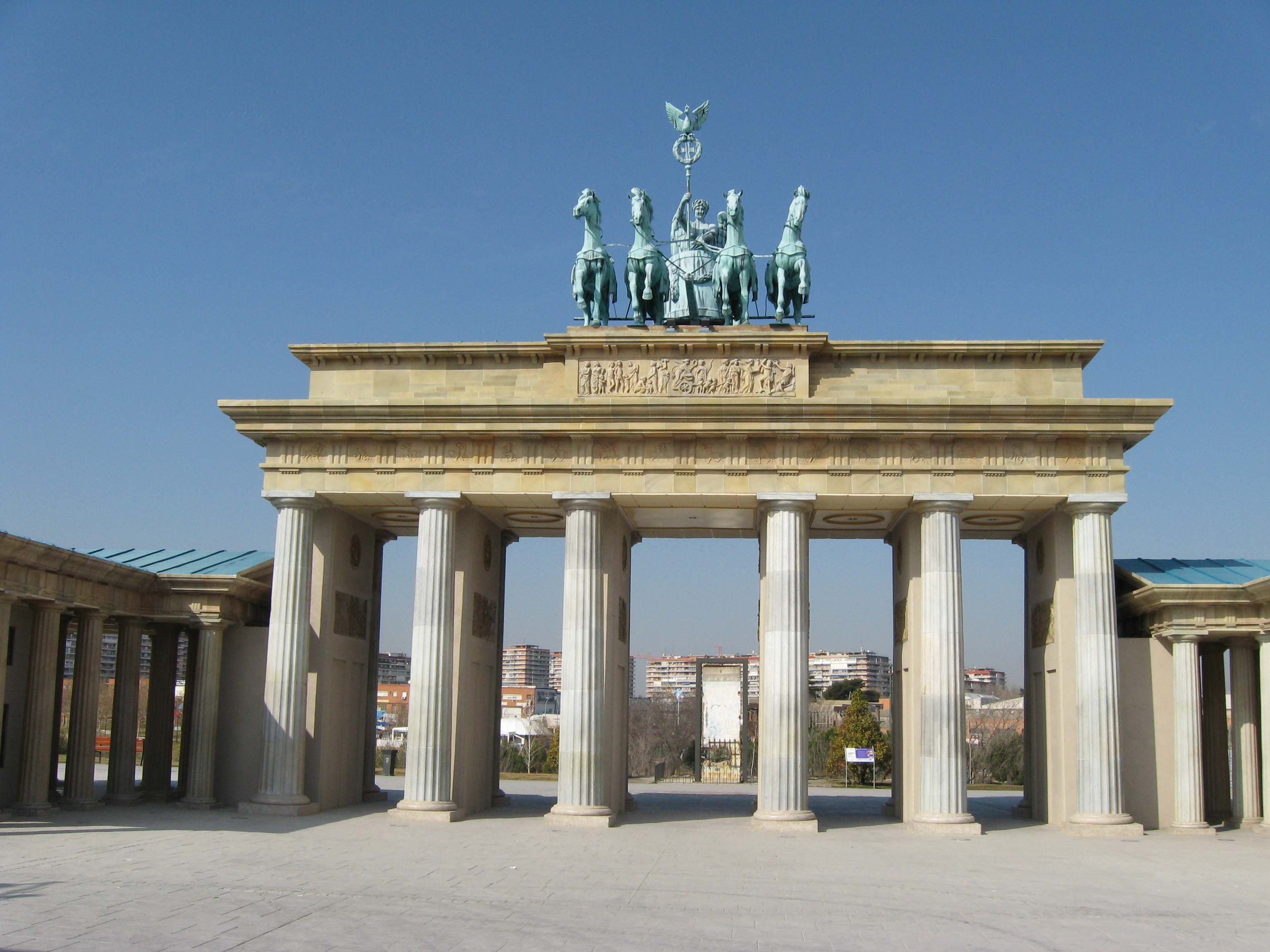 Reproducción, en el Parque Europa, Torrejón de Ardoz, Madrid